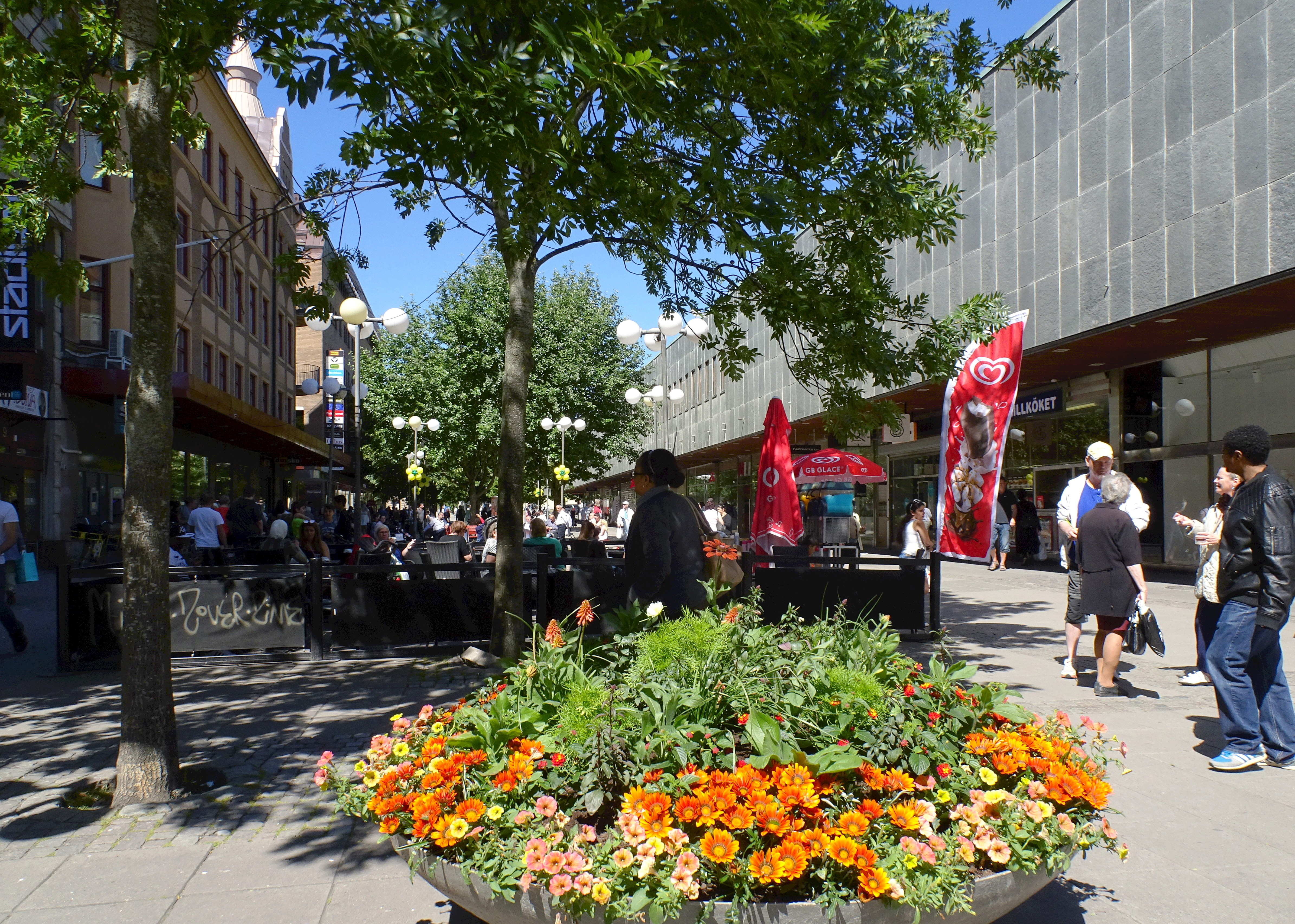 Storgatan, Södertälje med gamla EPA varuhuset t.h.